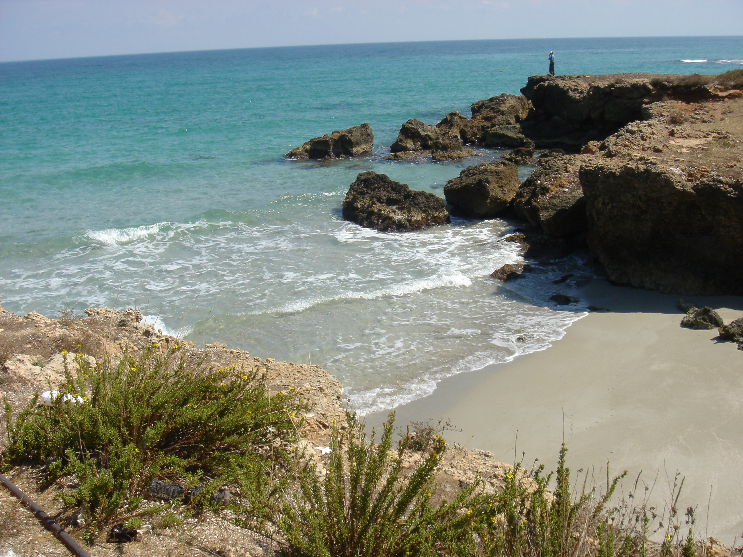 L'ho scattata io durante l'estate 2005. Si tratta di una spiaggetta specchiollese. Pubblico dominio.